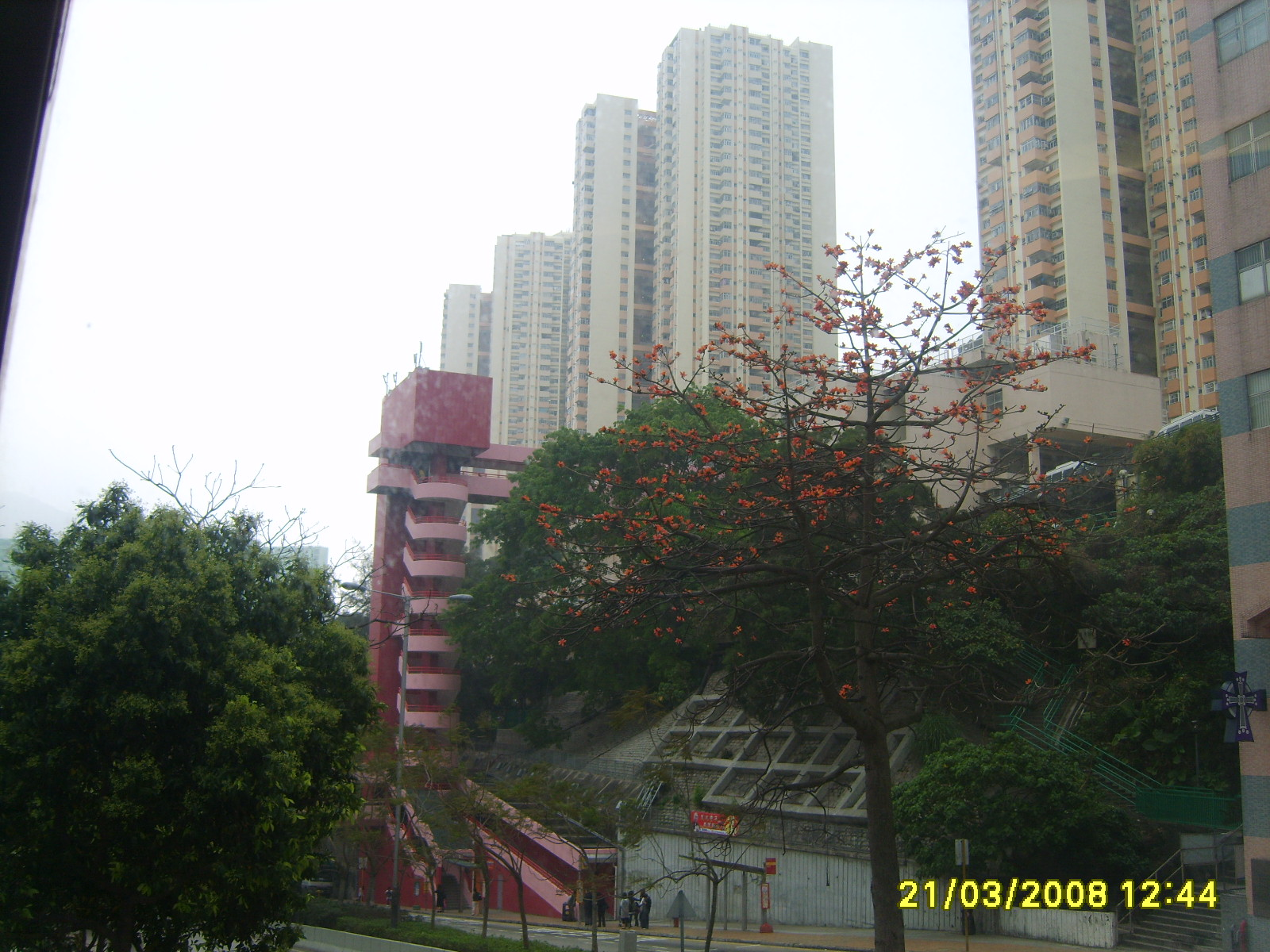 興民邨升降機塔